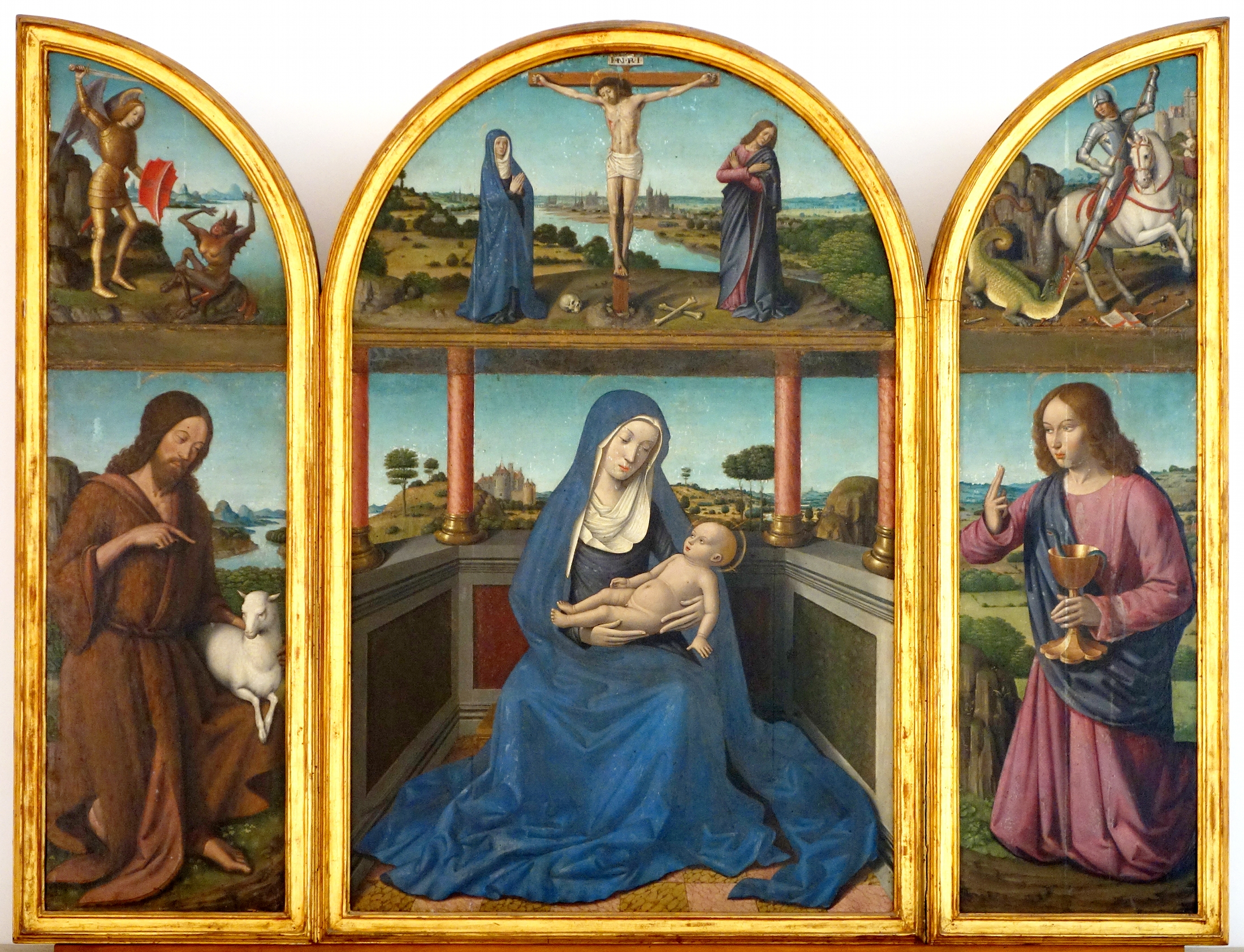 Vierge à l'enfant, saint Jean Baptiste et Jean l'évangéliste, avec dans le panneau du milieu en haut, représentation de la ville de Tours, début XVIe siècletitle QS:P1476,fr:"Vierge à l'enfant, saint Jean Baptiste et Jean l'évangéliste, avec dans le panneau du milieu en haut, représentation de la ville de Tours, début XVIe siècle" label QS:Lfr,"Vierge à l'enfant, saint Jean Baptiste et Jean l'évangéliste, avec dans le panneau du milieu en haut, représentation de la ville de Tours, début XVIe siècle"